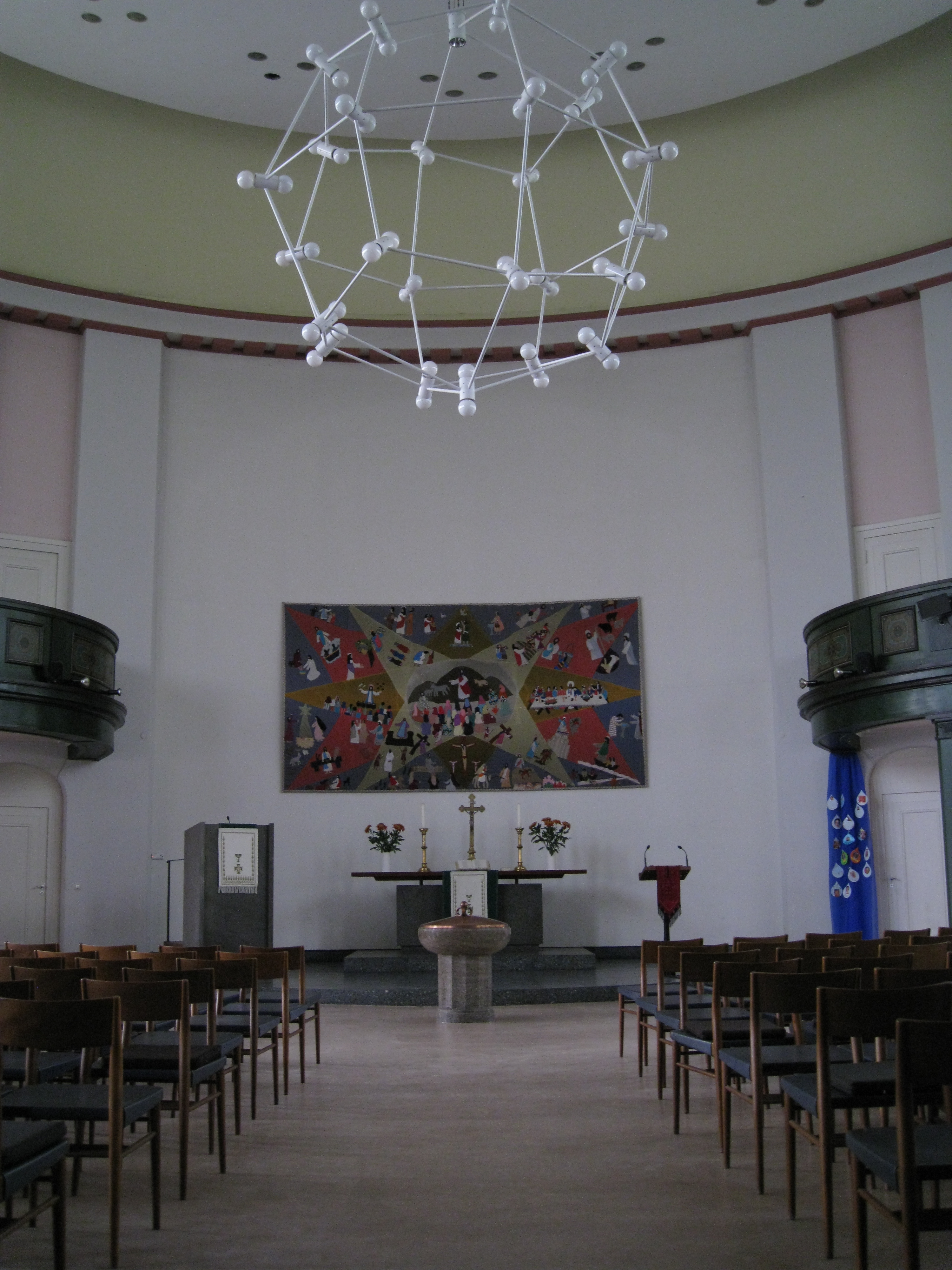 Blick auf den Altar